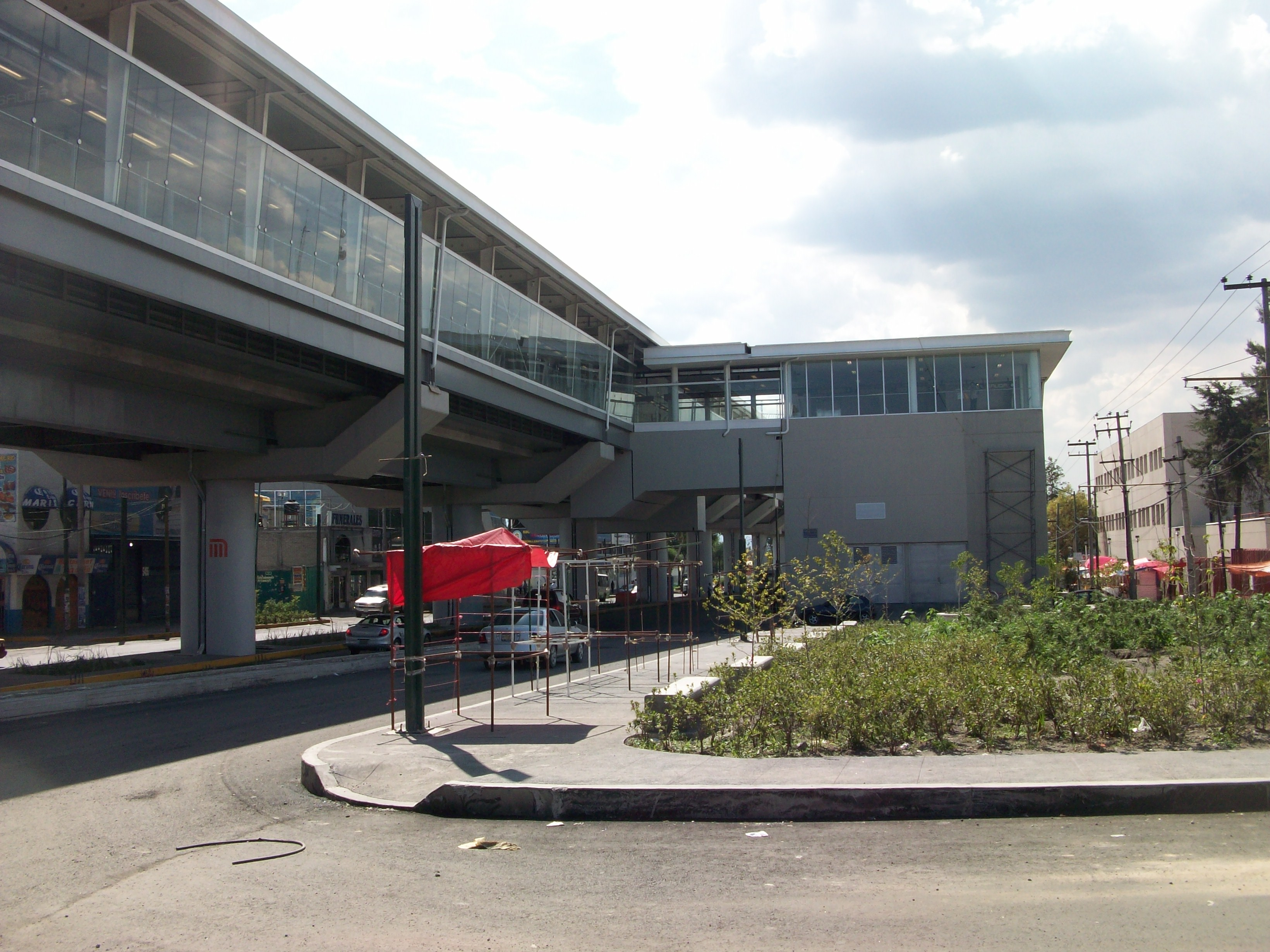 Estacion Tezonco